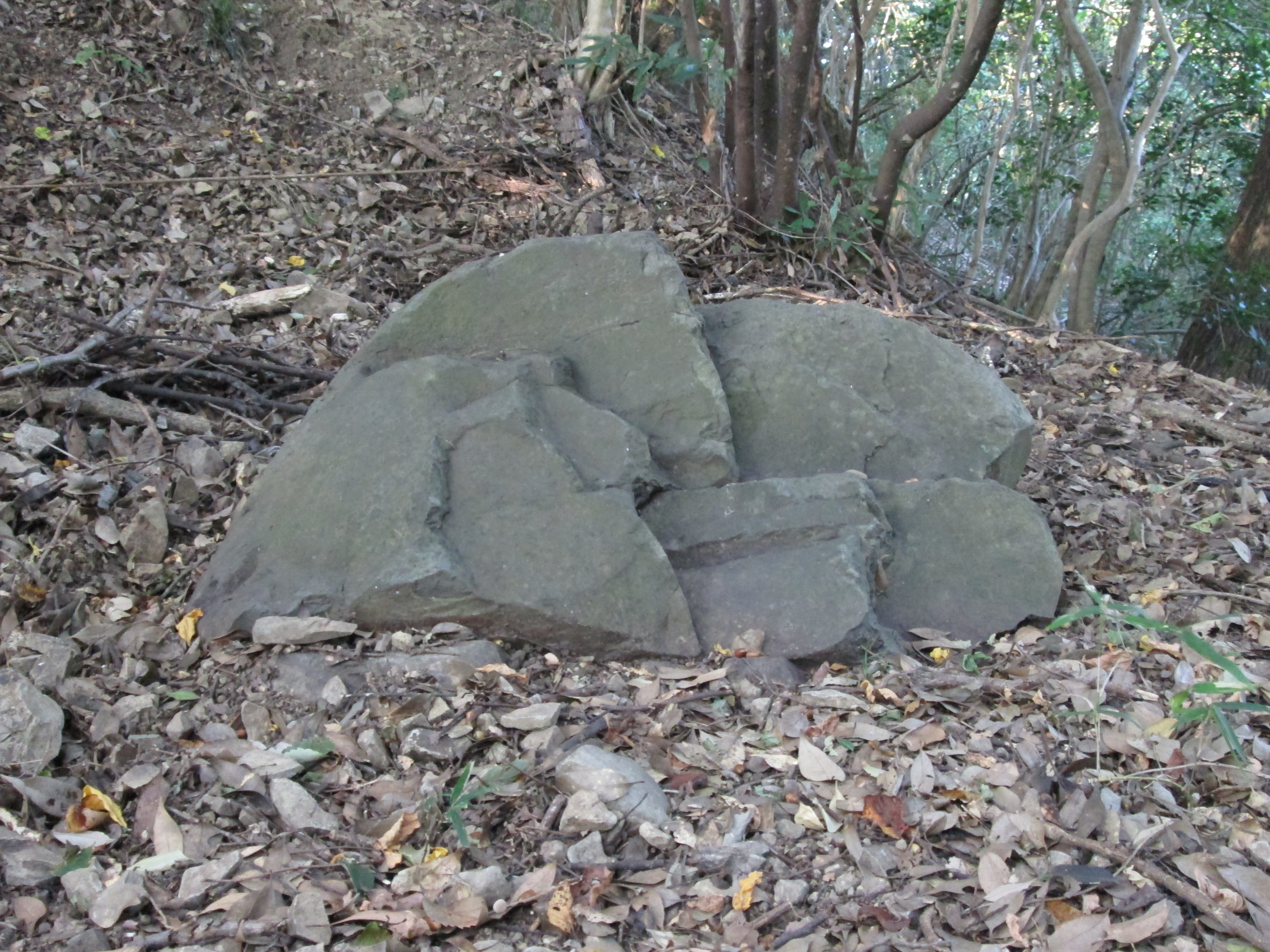 山中幸盛が、槍を砥いだとされる石